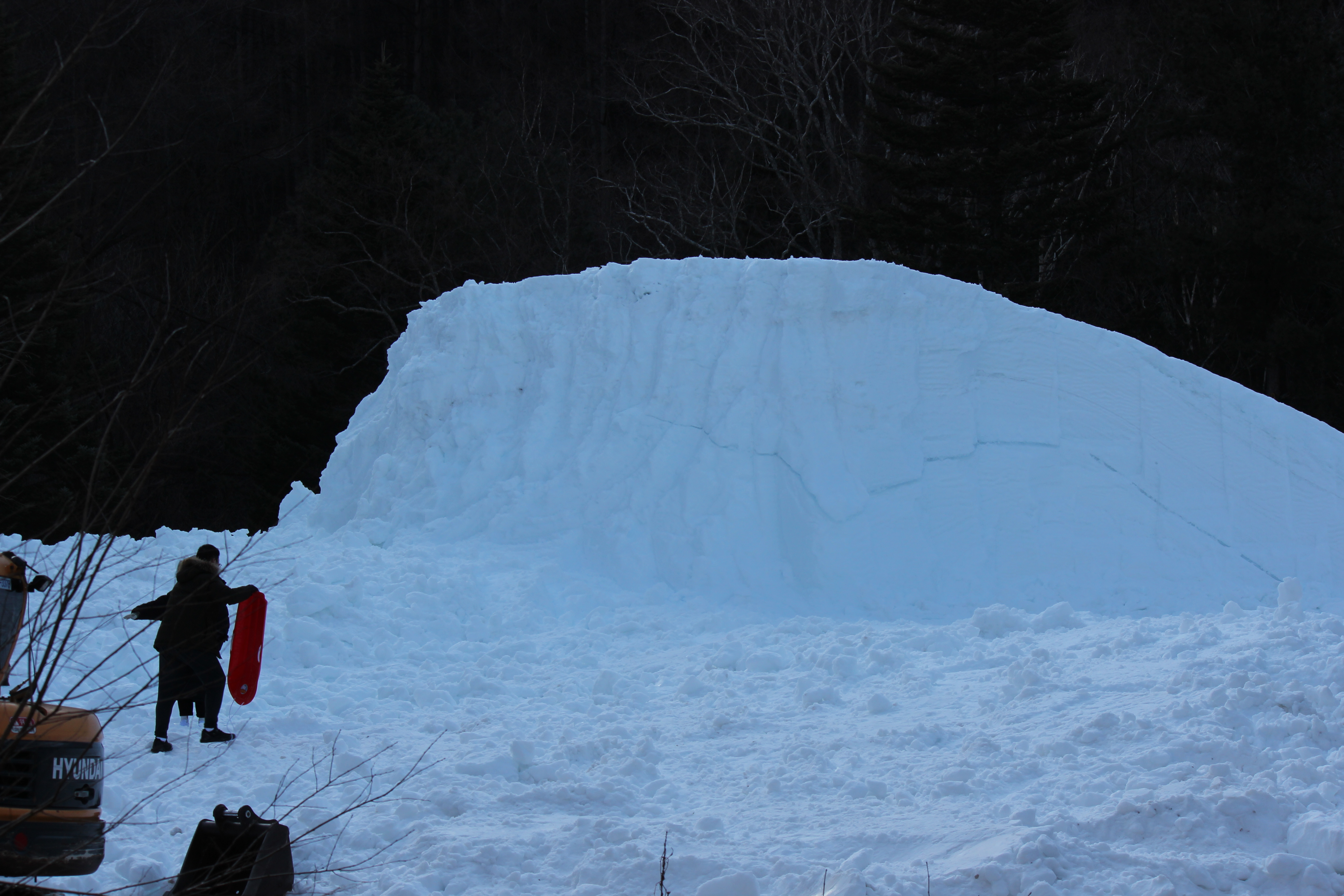 태백산의 눈축제에 있는 눈